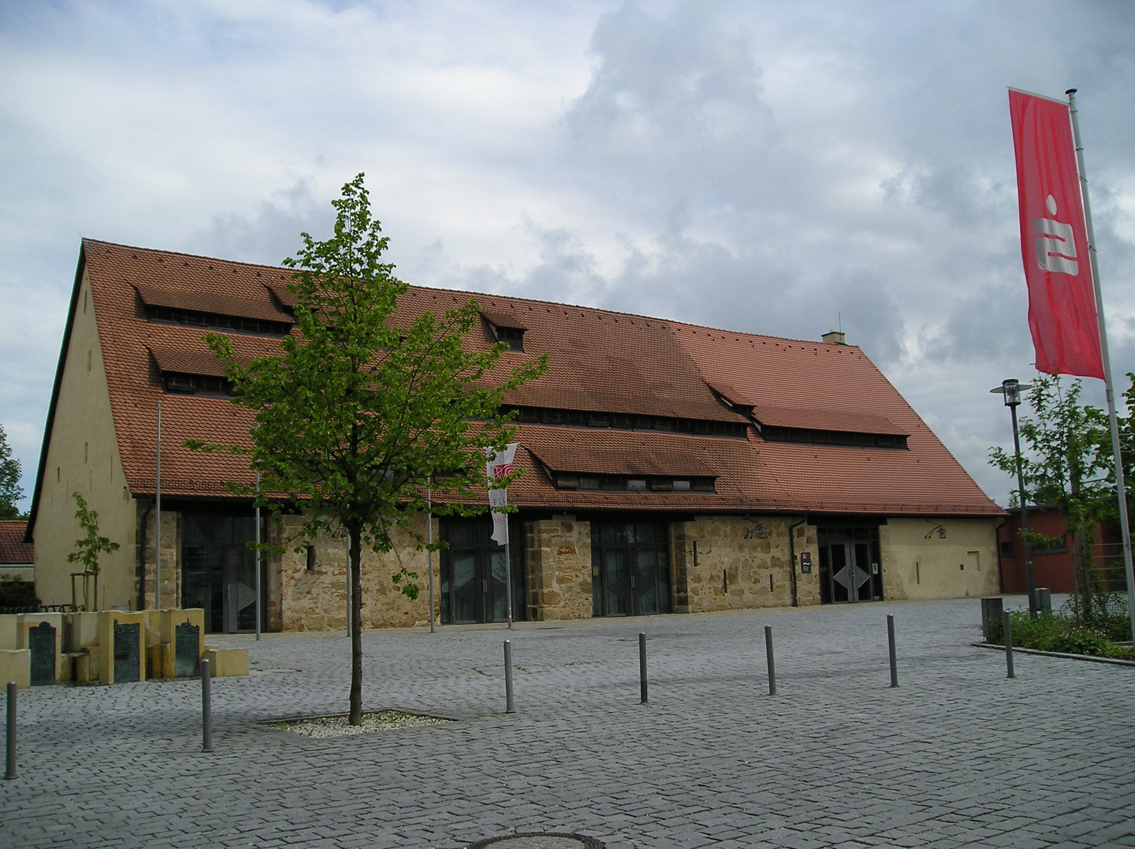 Zehntscheune in Neunkirchen am Brand, Bavaria, Germany.